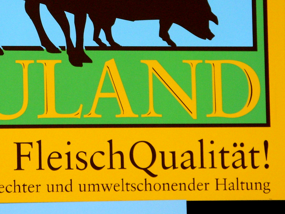 standardabweichende Schreibung in Berlin-Mitte-Wedding (Germany)